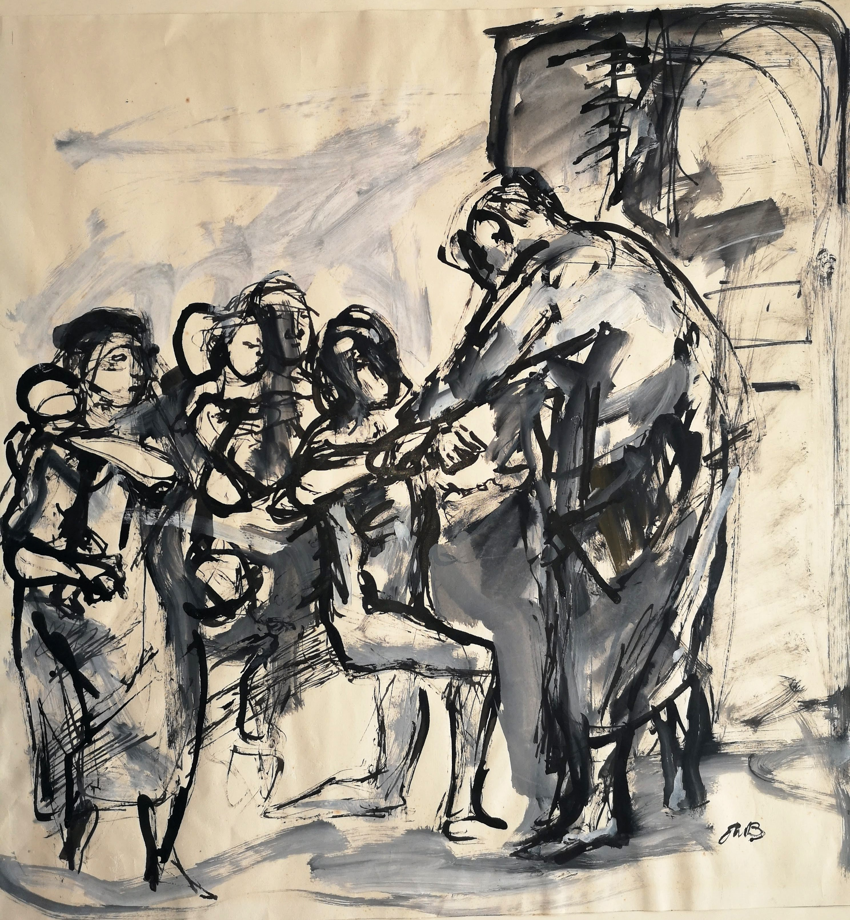 Tuschtegning af bibelsk motiv, mand der knæler foran Jesus, kvinde med barn i forgrunden